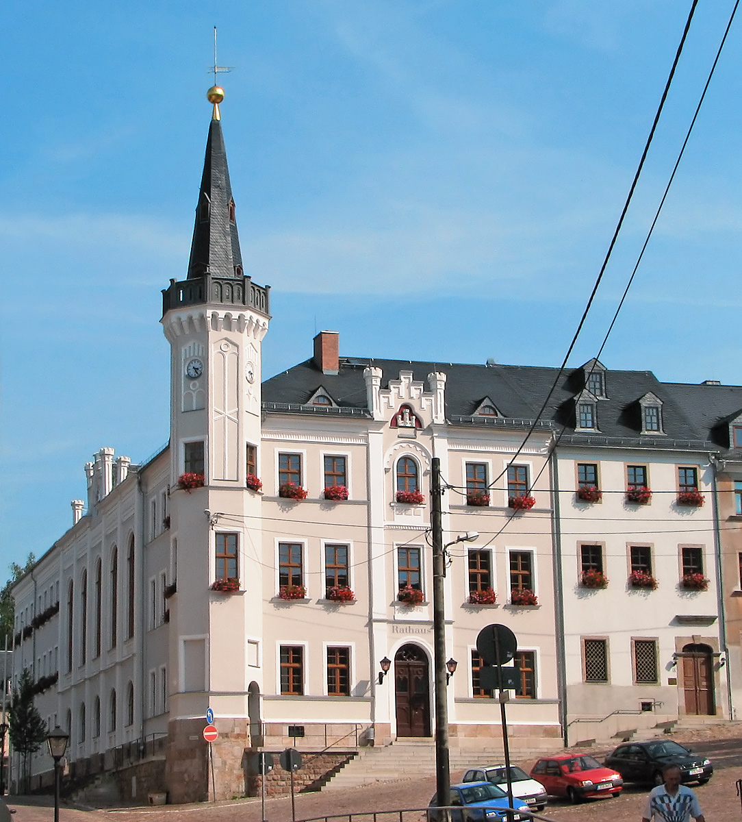 Beschreibung: Rathaus - city hall / Kirchberg in Sachsen (Saxony, Germany) Fotograf: Darkone, 28. August 2005